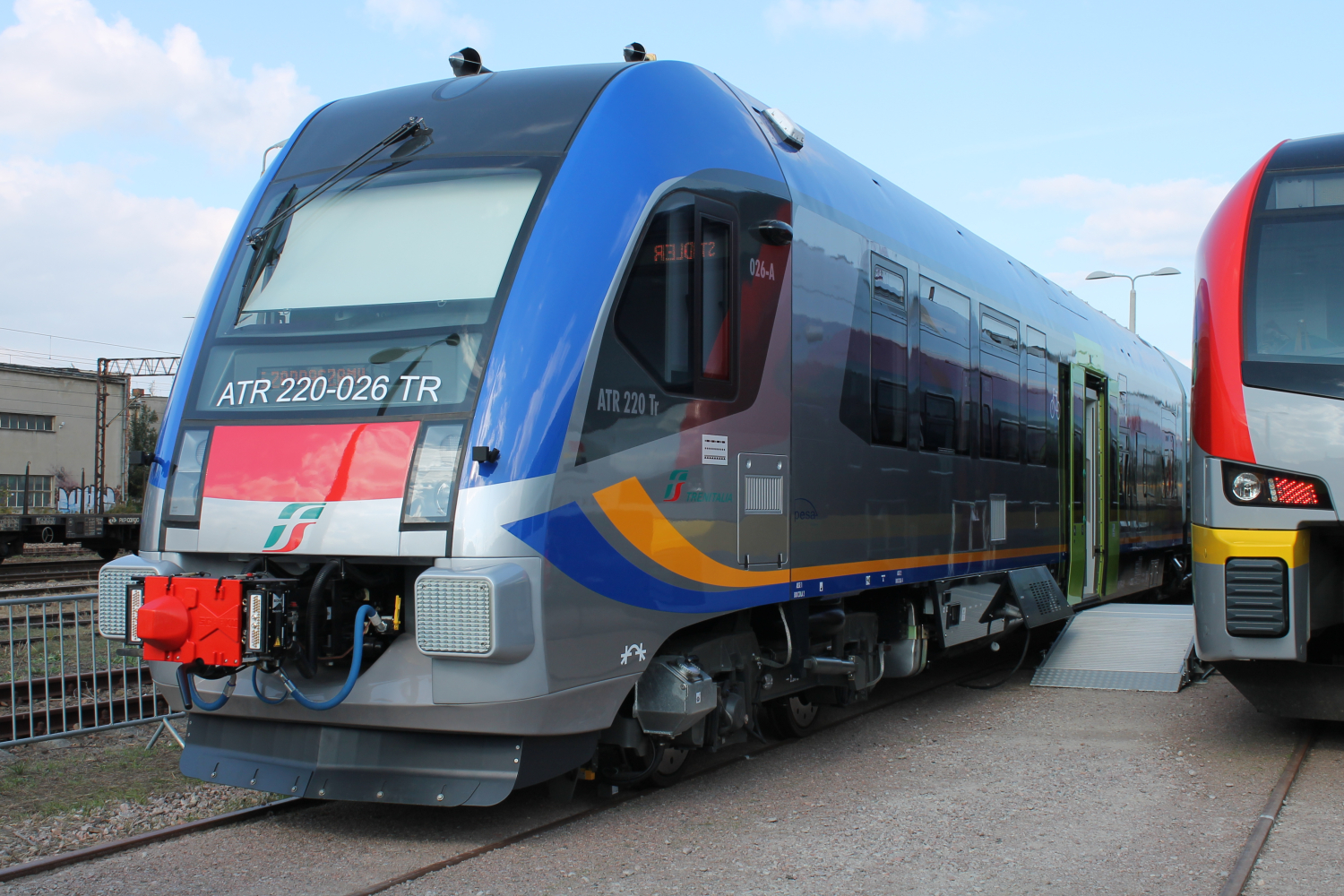 Spalinowy zespół trakcyjny ATR220-026Tr podczas targów Trako 2015. The making of this document was supported by Wikimedia Polska Association, within Wikigrant no. WG 2015-34.